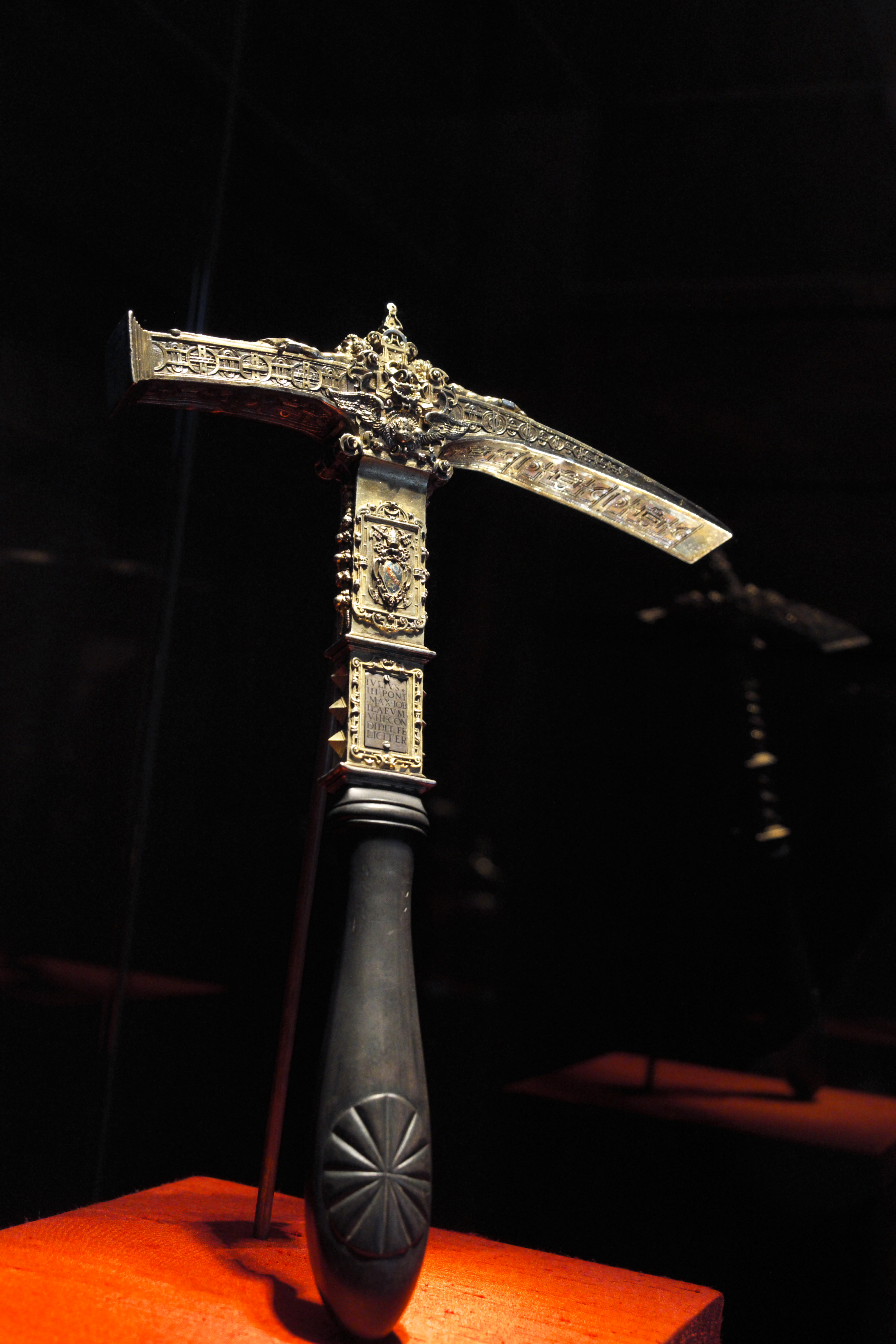 Bayerisches Nationalmuseum in München, Zeremonialhammer von Papst Julius III. zur Öffnung der Heiligen Pforte im Jahr 1550 (Dillinger Hammer)